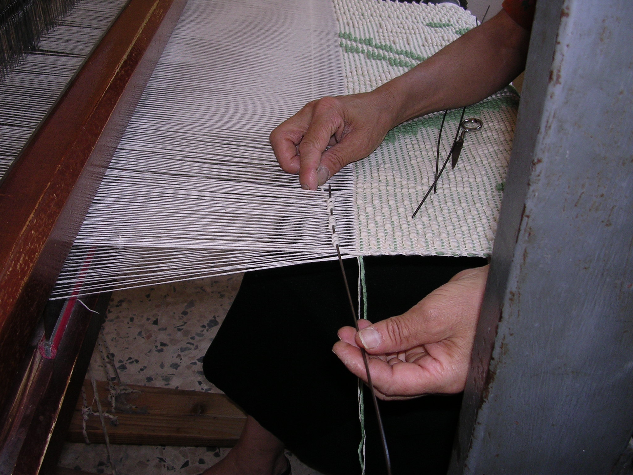 Donna del paese di Ulassai che tesse su telaio orizzontale